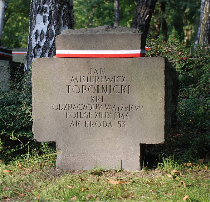 Grób Jana Musiurewicza, ps. Topolnicki, Powązki wojskowe w Warszawie